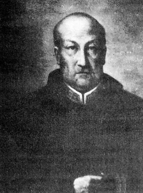 José Mateo Aguilar (1794-1862), sacerdote peruano que destacó como orador sagrado y por su caridad hacia los pobres.